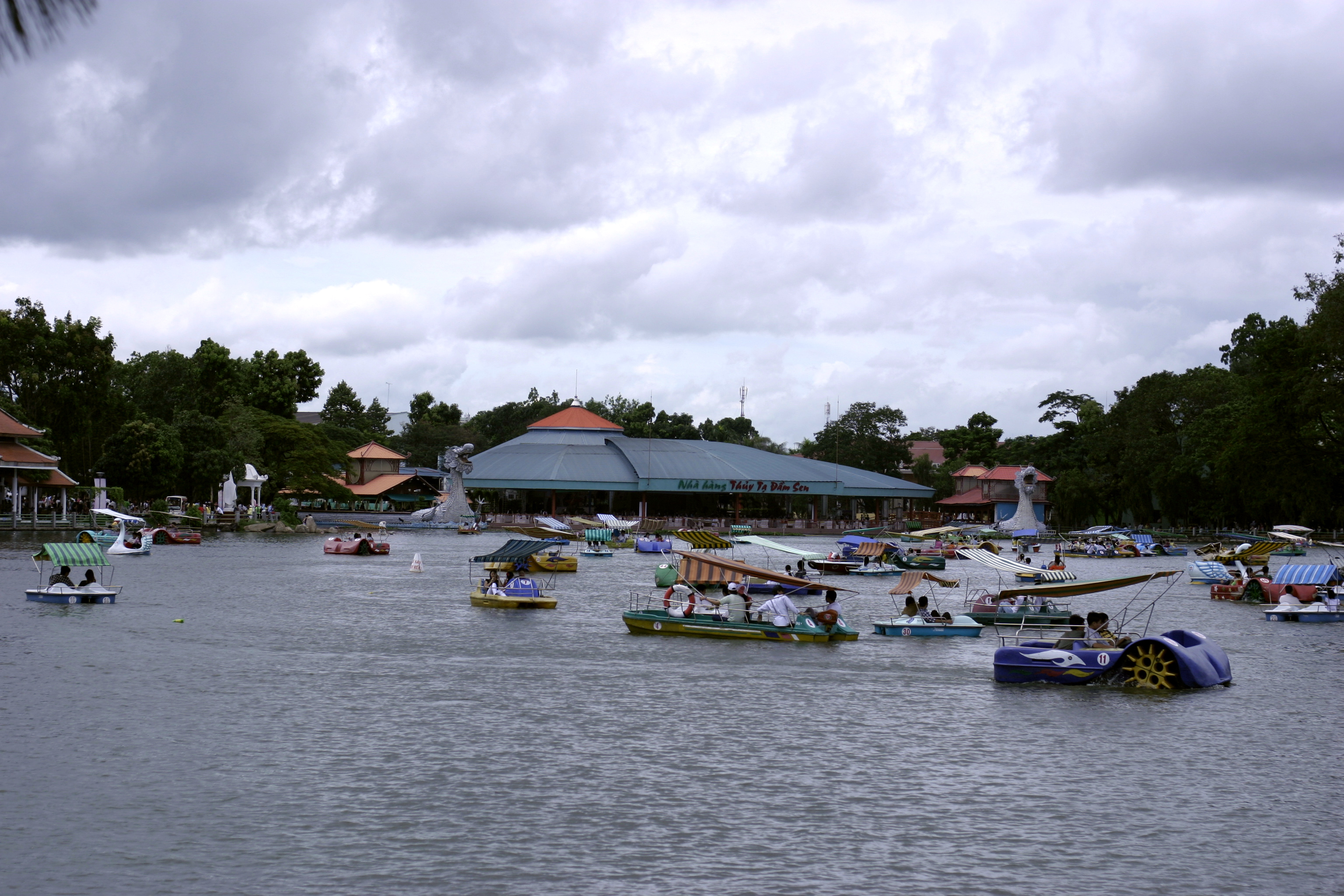 Đầm Sen Amusement Park.